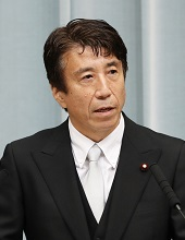 中文（中国大陆）: 日本农林水产大臣斋藤健（第三次安倍第三次改造内阁）